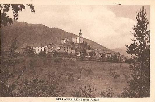 Village de Bellafaire (Alpes-de-haute-Provence)